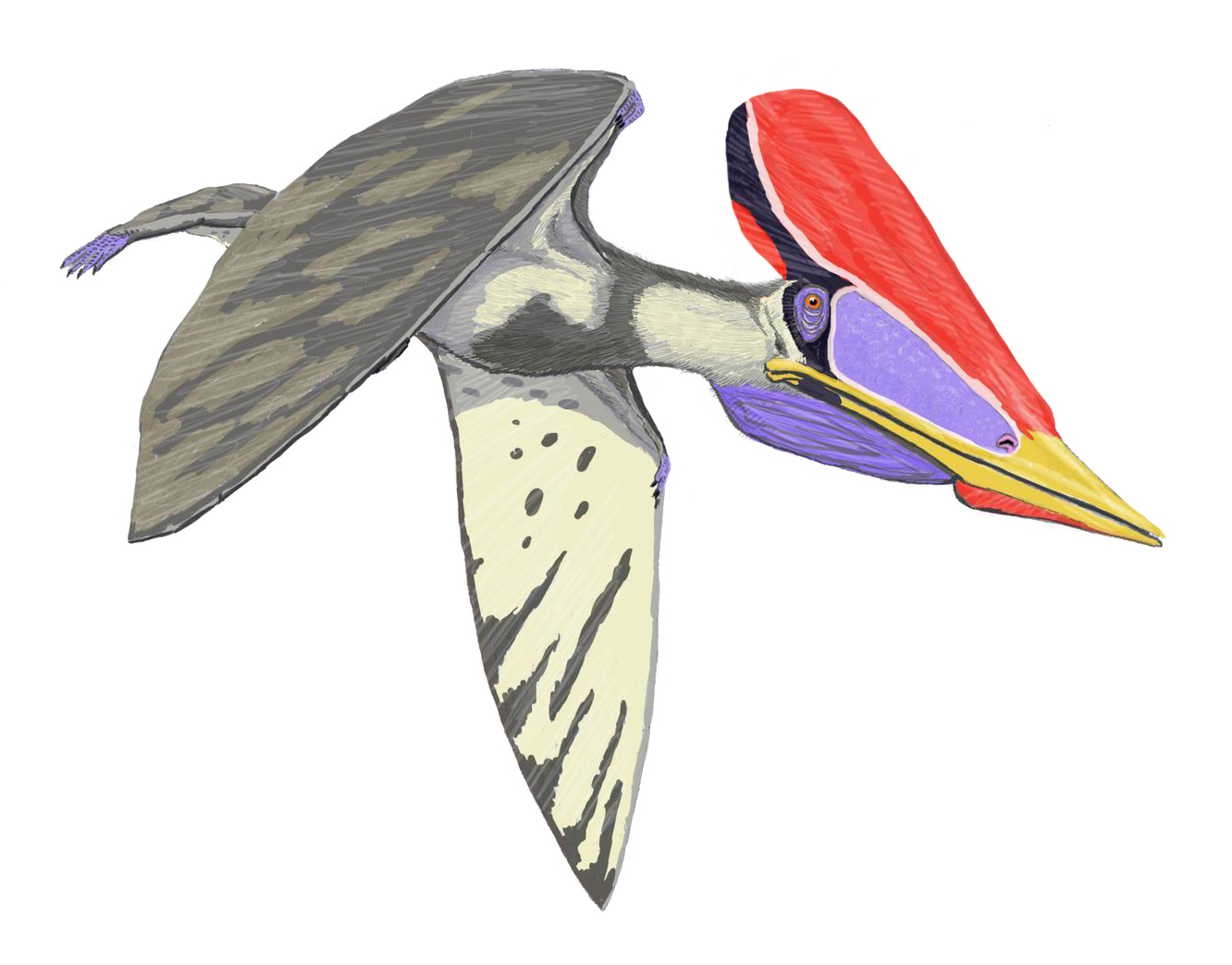 Tupuxara longicristatus